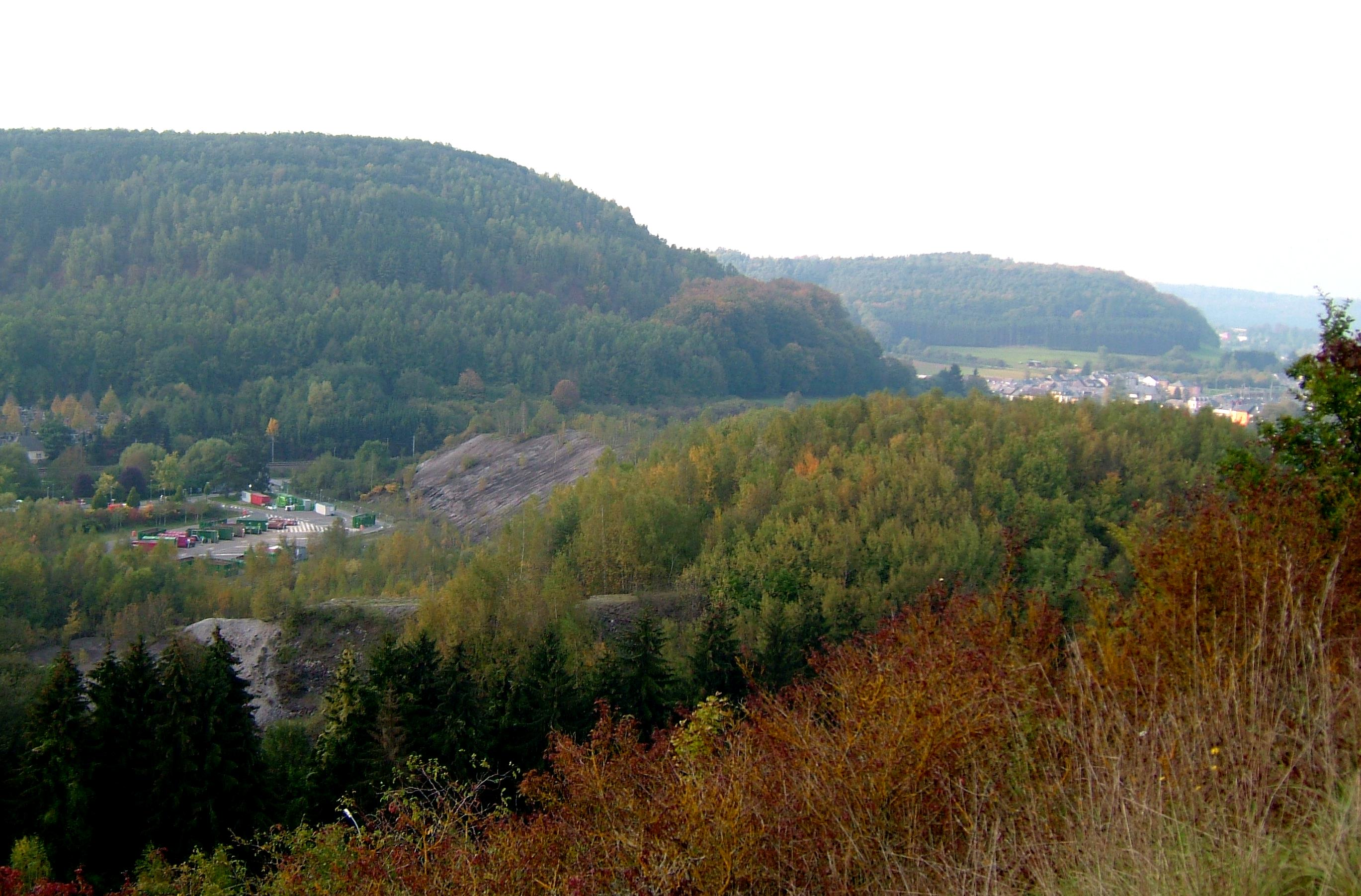 De Millebierg bei Téiteng .